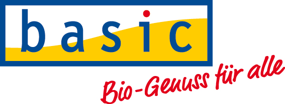 Logo der deutschen Bio-Supermarkt-Handelskette Basic AG